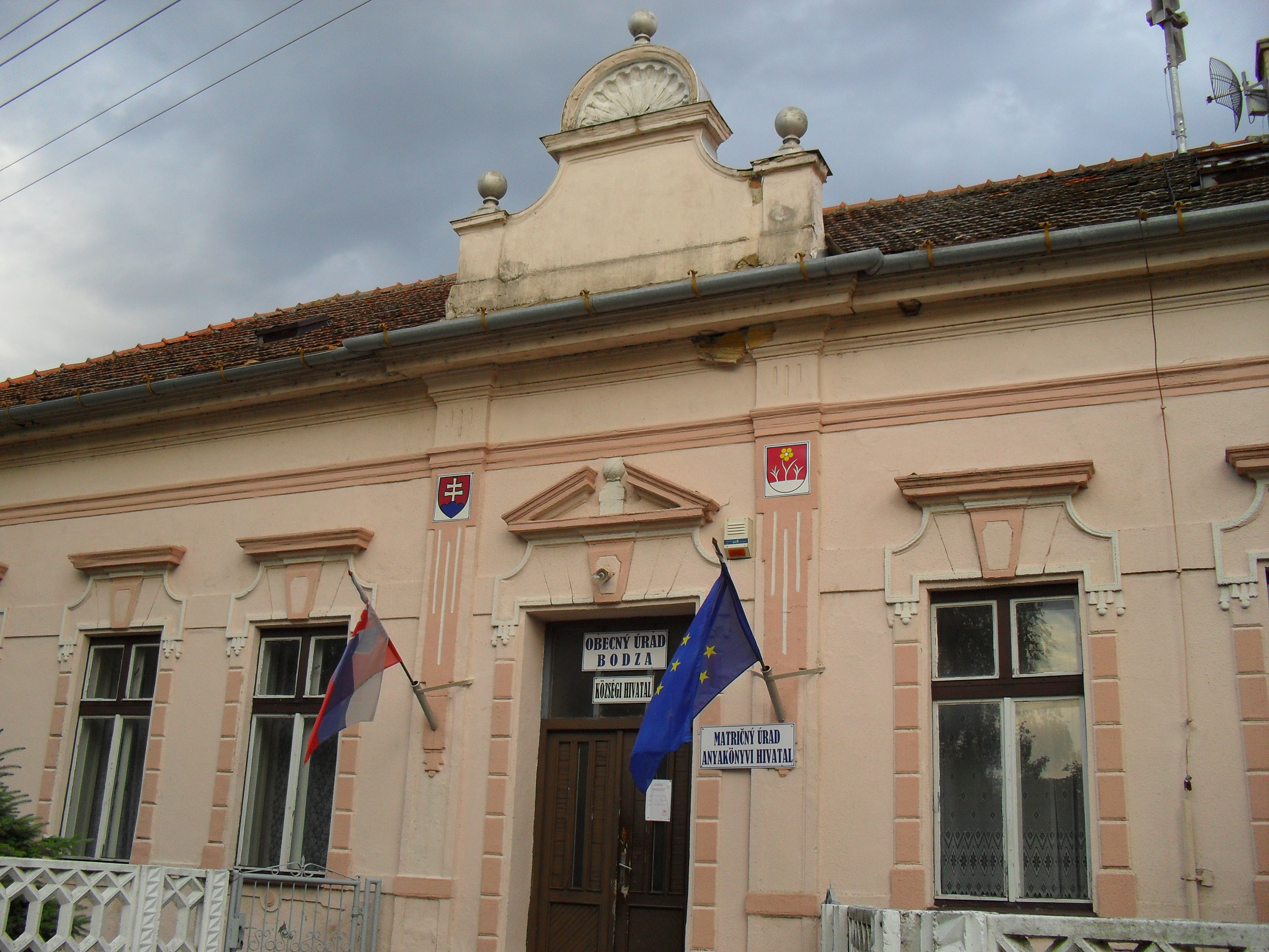 Bogya - községháza